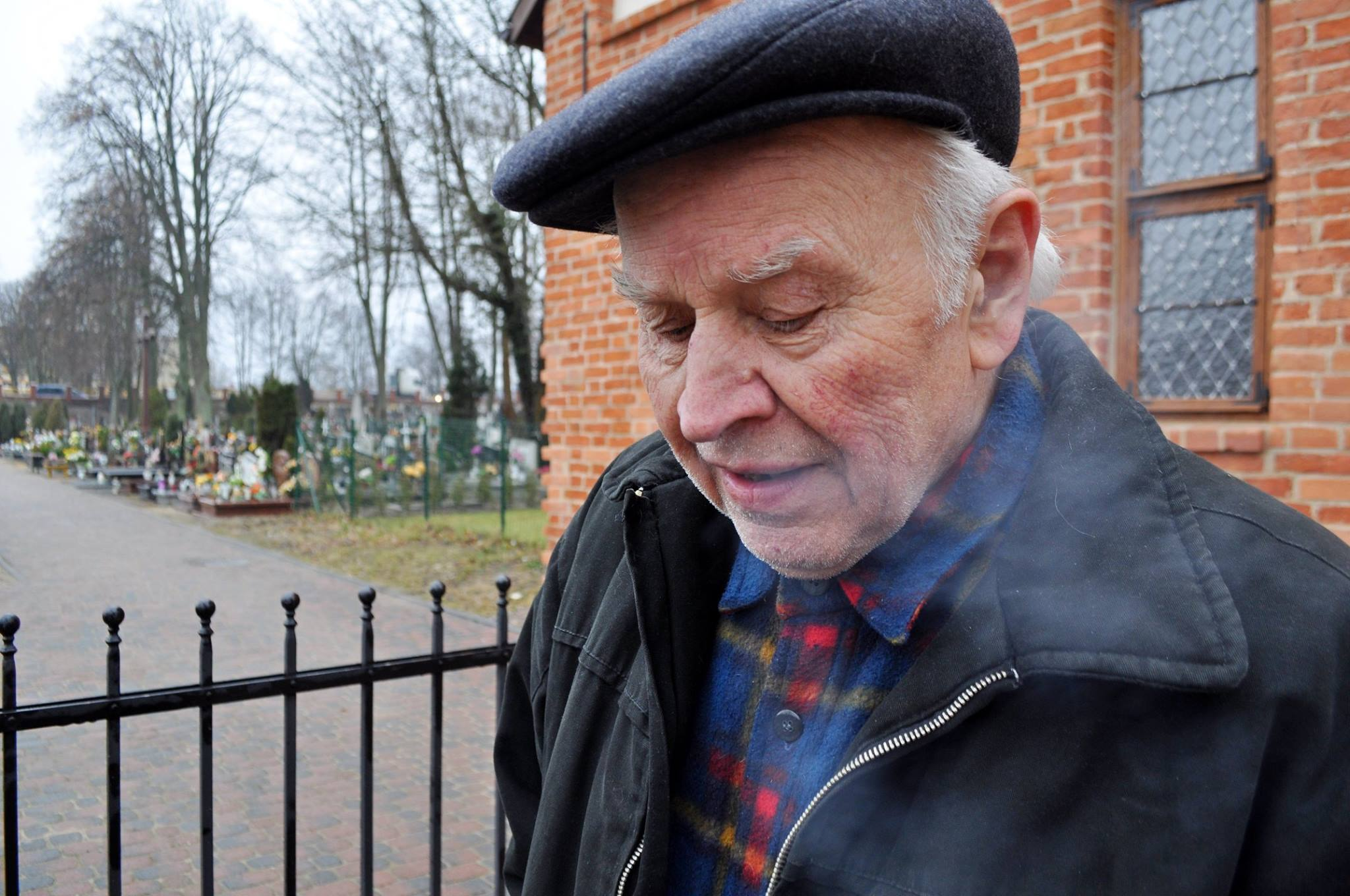 Fotografia przedstawia Stanisława Zielińskiego w roku 2012.